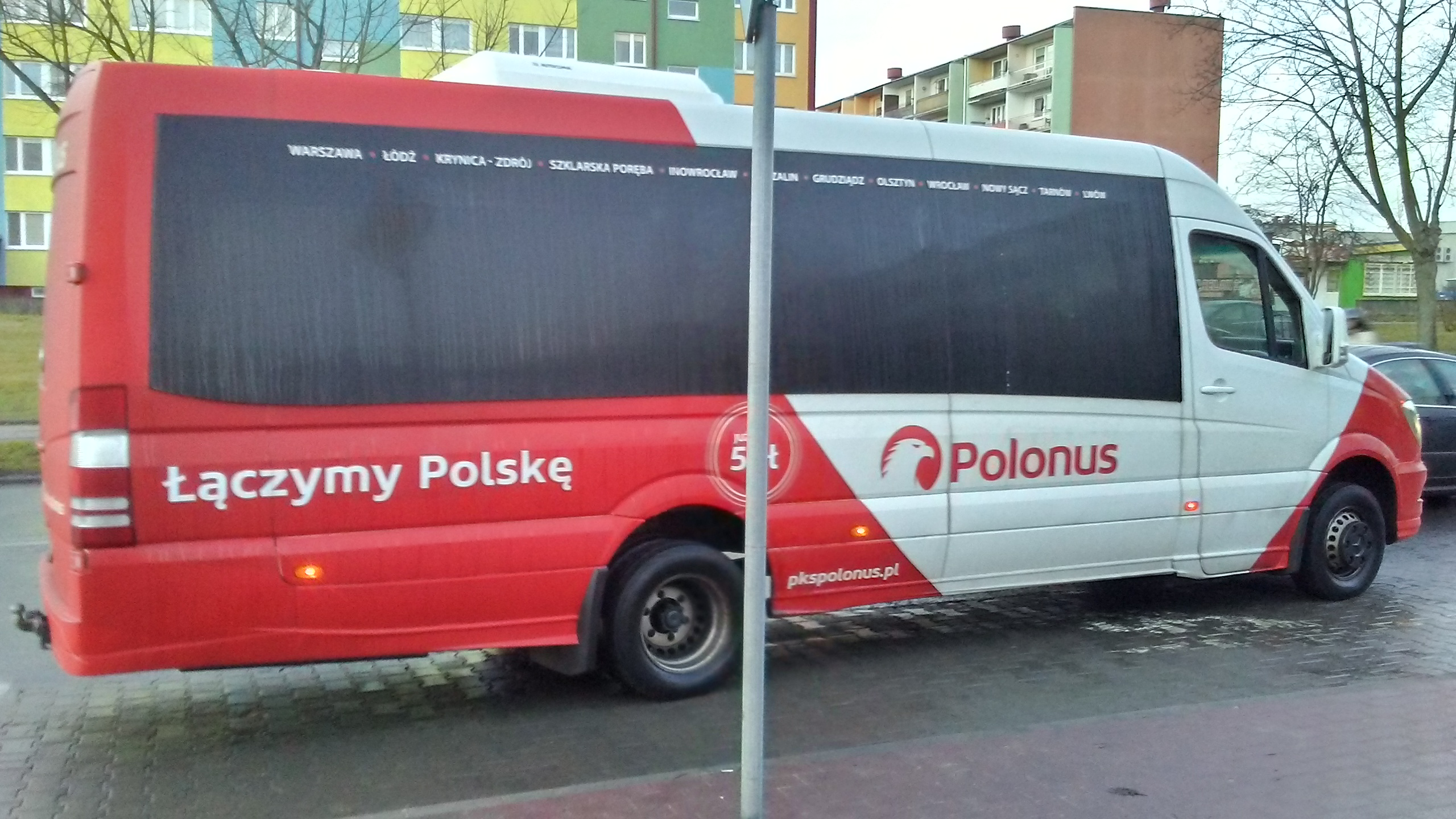 Tomaszów Mazowiecki w województwie łódzkim, PL, EU. Bus warszawskiego Polonusa wracający spod Areny Lodowej Tomaszów Mazowiecki, CC0